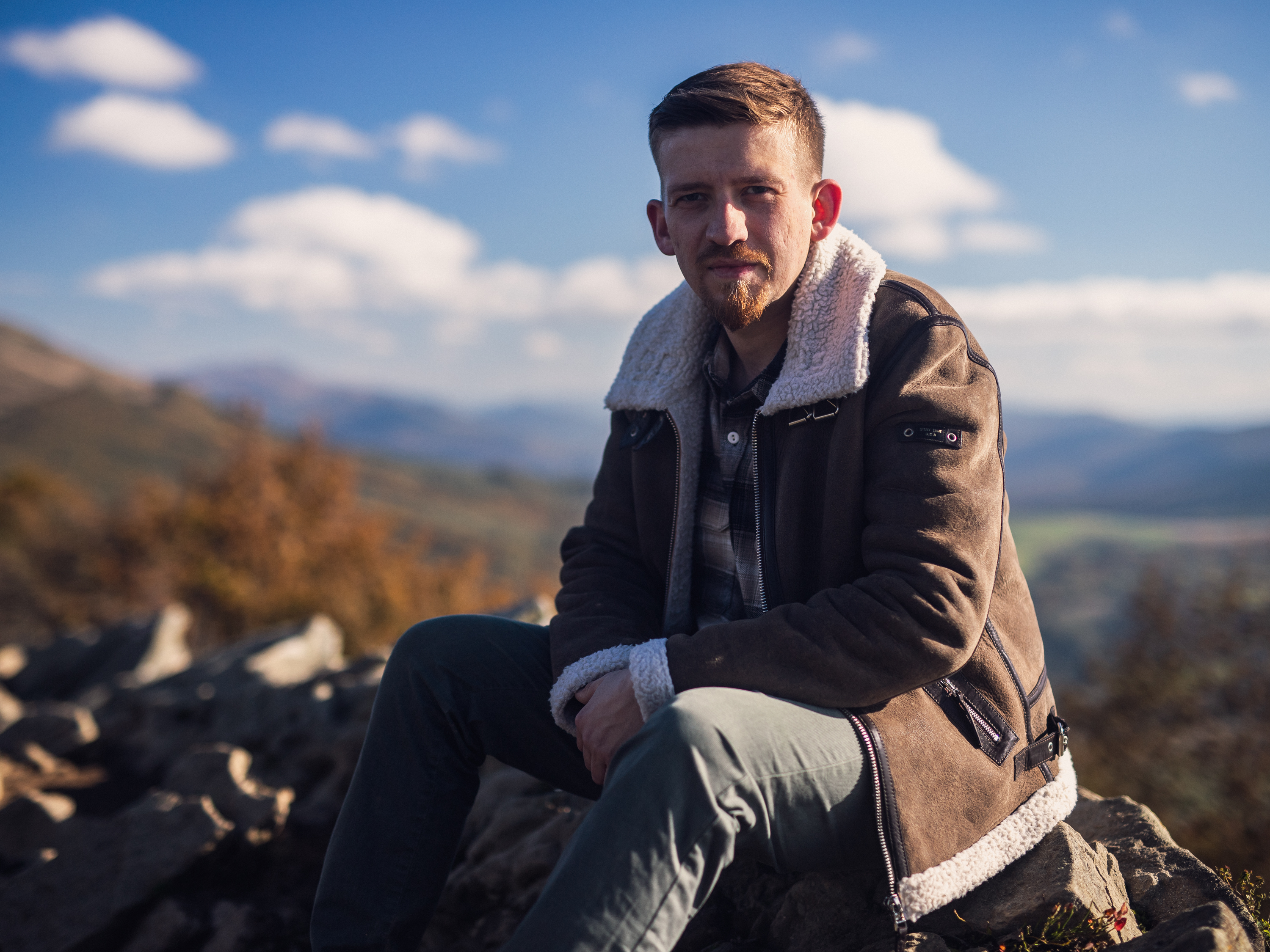 Michał Miotke - Cztery Pory Miłowania, podczas koncertu odbywającego się w dniu 17.05.2019r.